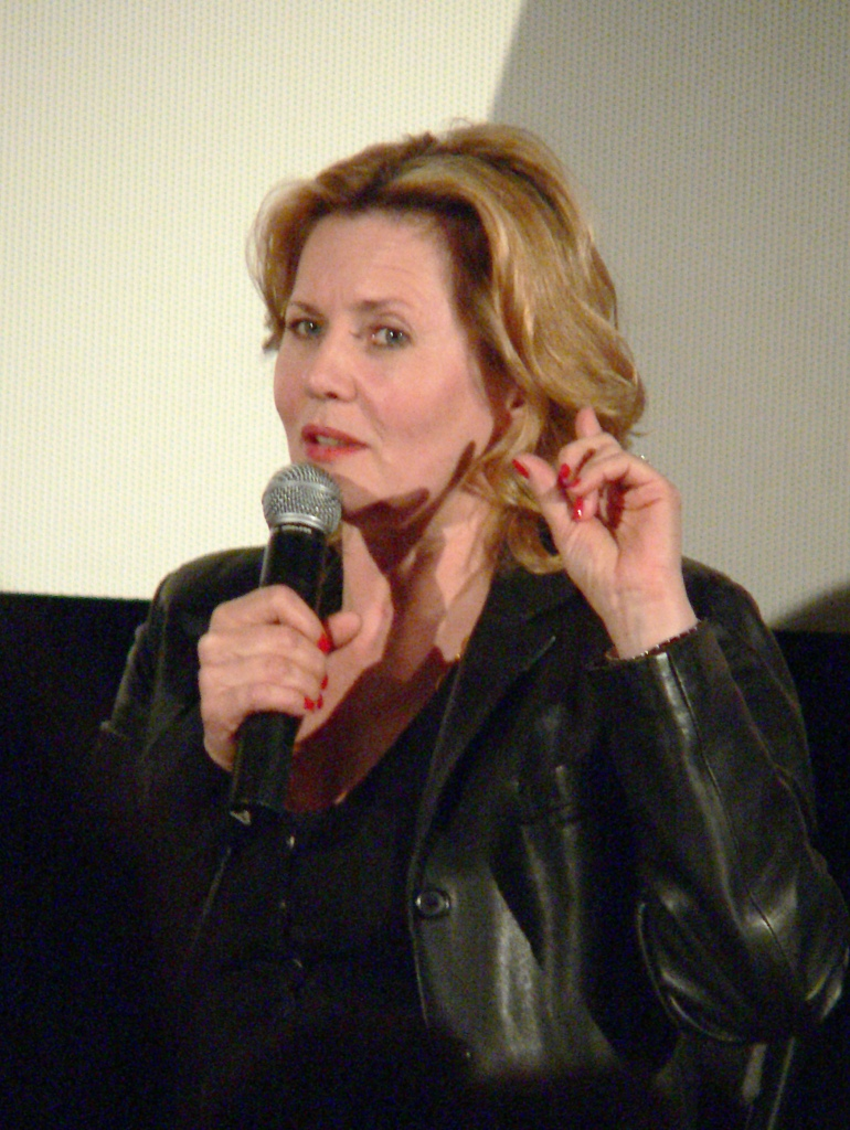 Grażyna Szapołowska - zdjęcie zrobione podczas panelu dyskusji w Warszawym Kinie Luna 12-06-2005, po pokazie filmu "Inne Spojrzenie" z okazji Dni Równości 2005.